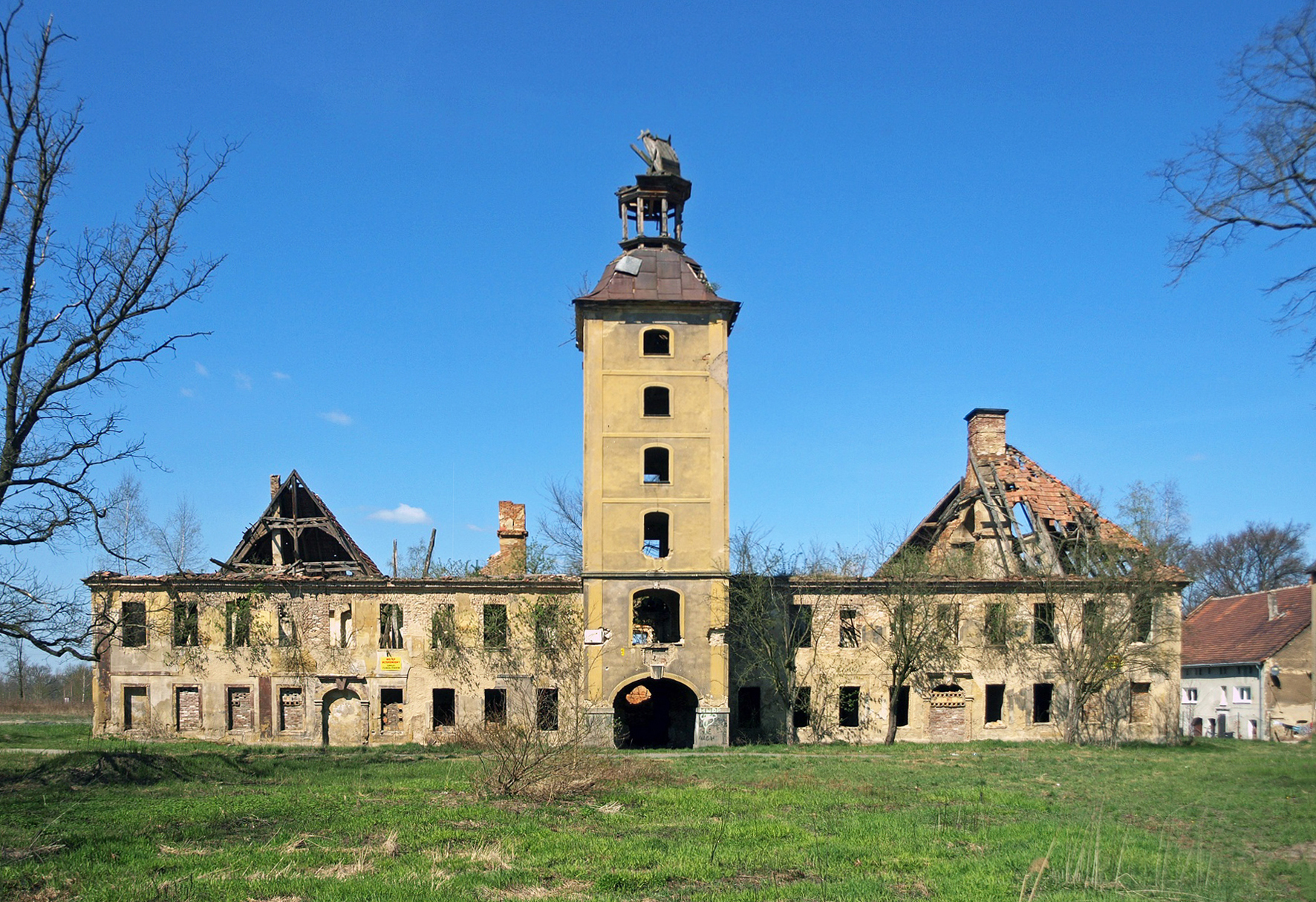 Ruine des Schlosses Florsdorf (Żarska Wieś)